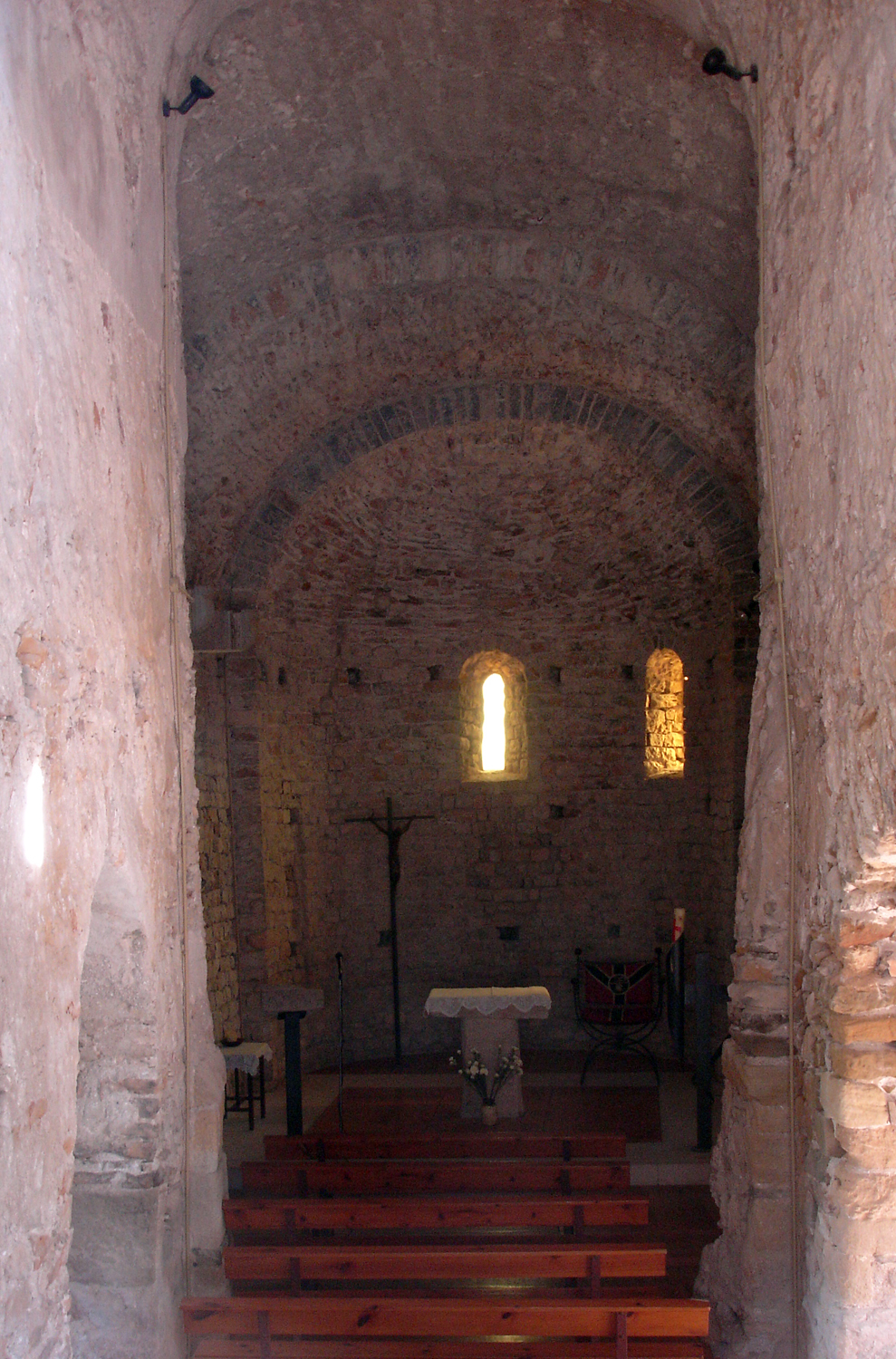 Esglèsia de Sant Joan de Bellcaire (Girona, Catalunya, Espanya)